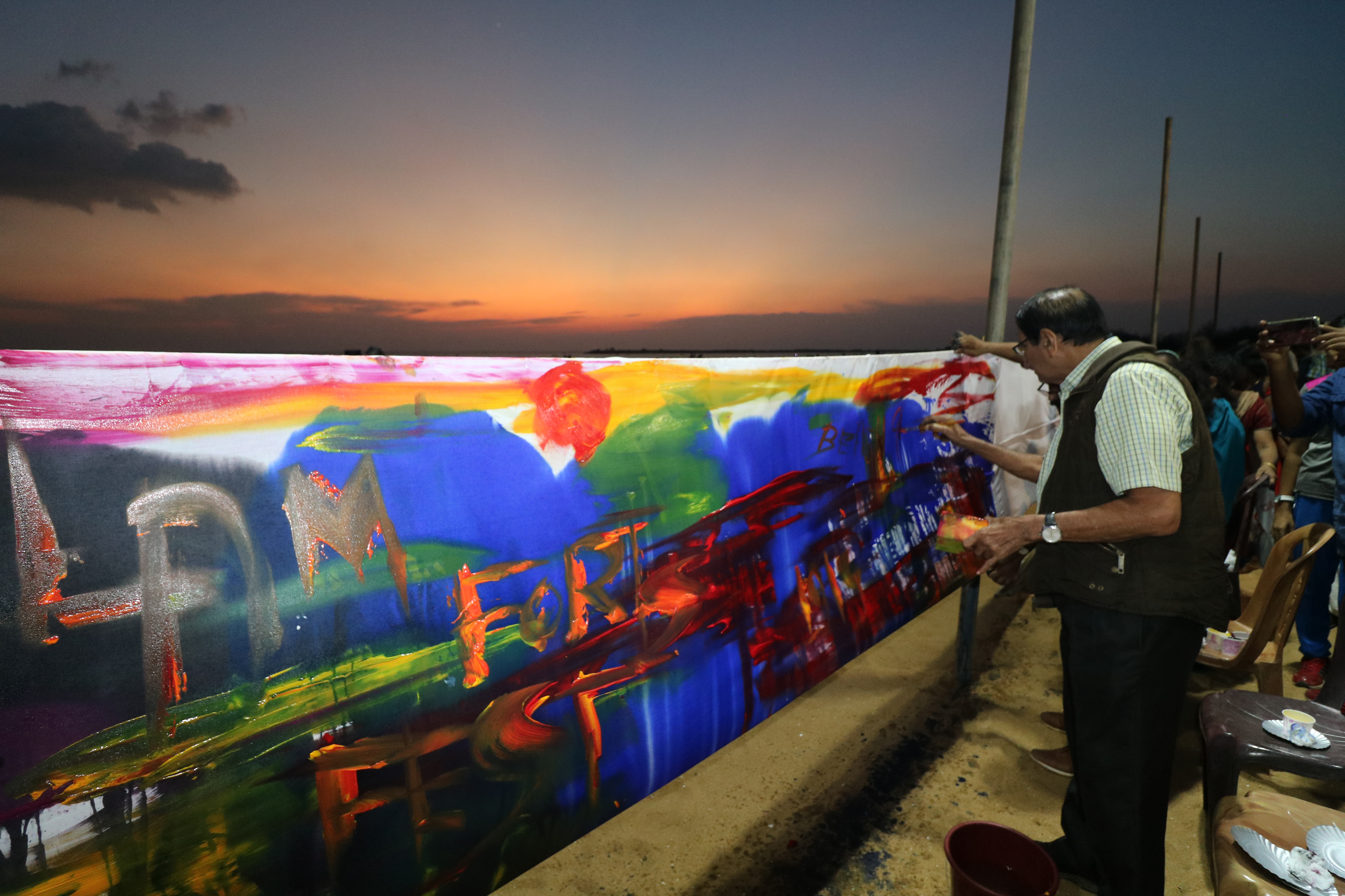 പുണിഞ്ചിത്തായ് കൊല്ലം ബീച്ച് ഫെസ്റ്റ് ഉദ്ഘാടനം ചെയ്യുന്നു 2019